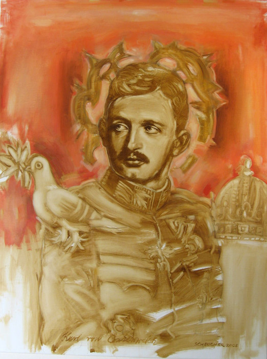 Kaiser Karl Ititle QS:P1476,de:"Kaiser Karl I" label QS:Lde,"Kaiser Karl I"